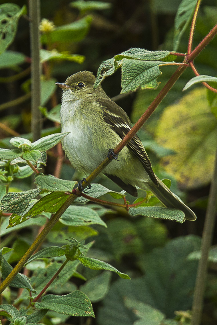 Sierran Elaenia - South Ecuador - _S4E9920